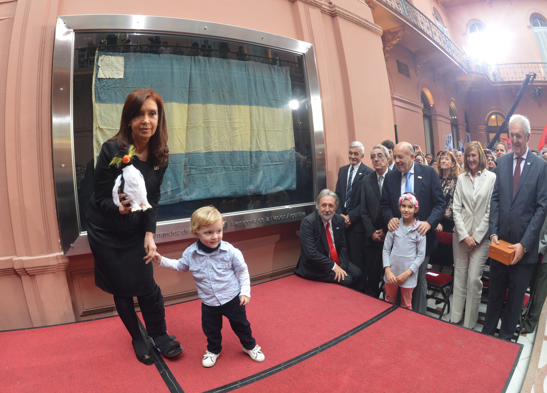 La presidente Cristina Fernández luego de descubrir una bandera del Operativo Cóndor, la cual flameó en las Islas Malvinas. Patio Islas Malvinas de la Casa Rosada en Buenos Aires.